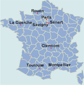 localisation des clubs de la Division élite du championnat de France de baseball 2008. Map of the baseball french élite division 2008.